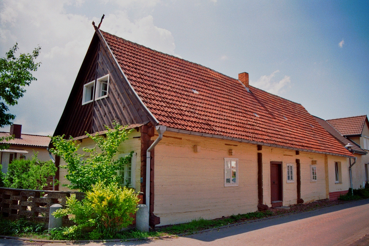 Historisches Wohnhaus, Am Hafen 10 in Burg (Spreewald), Landkreis Spree-Neiße, Brandenburg, Deutschland. Das Gebäude steht unter Denkmalschutz.